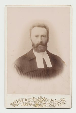 Juuru pastor Carl Hasselblatt